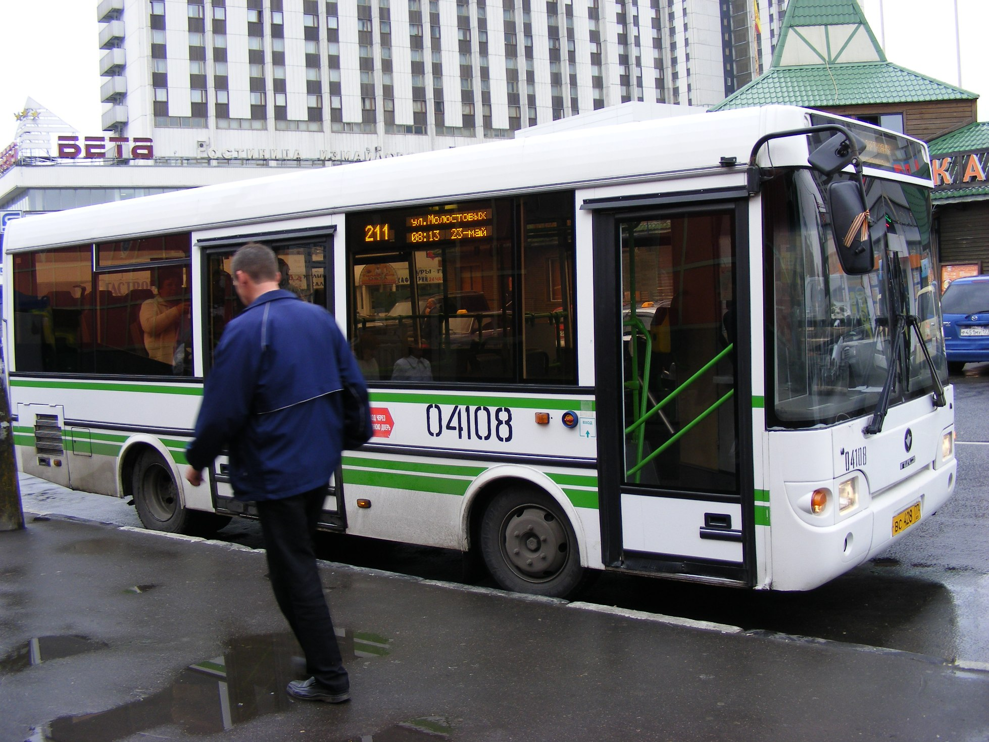 PAZ 3237